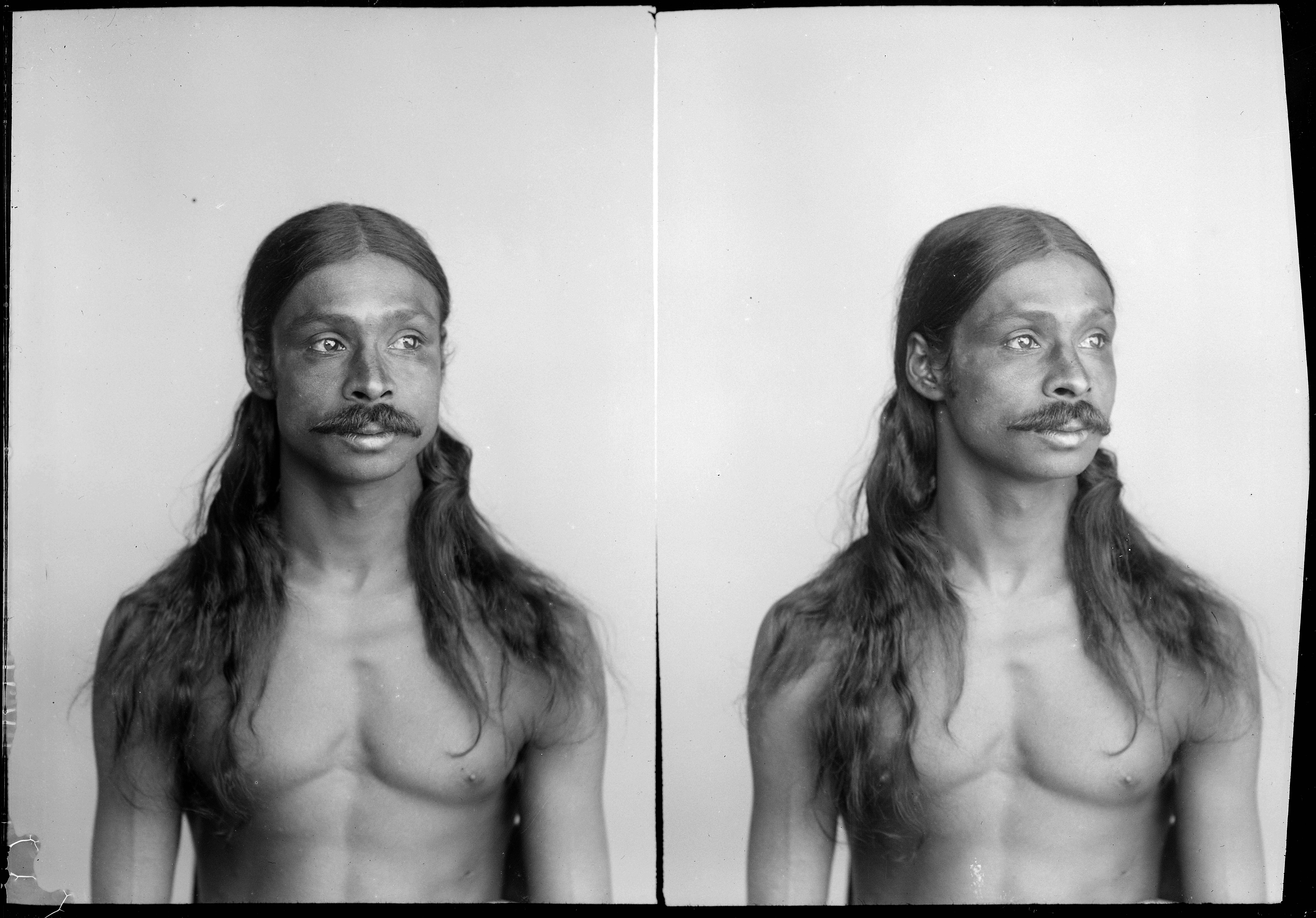 plaque négative au gélatino bromure d'argent, format 15x21 cm. Inscription manuscrite par Eugène Trutat sur l'enveloppe : " Ceylandais atelier du Musée obj. hémisphérique 4 Lumière bleue "